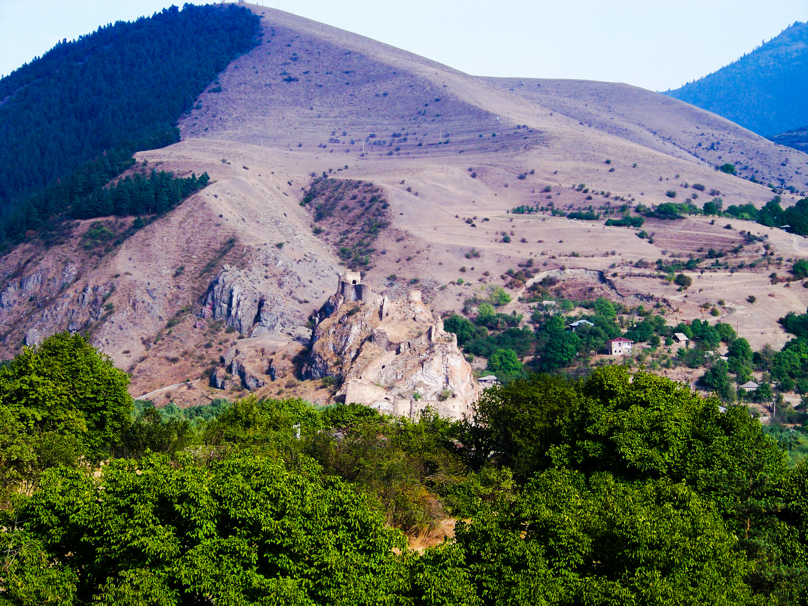 აწყურის ციხე